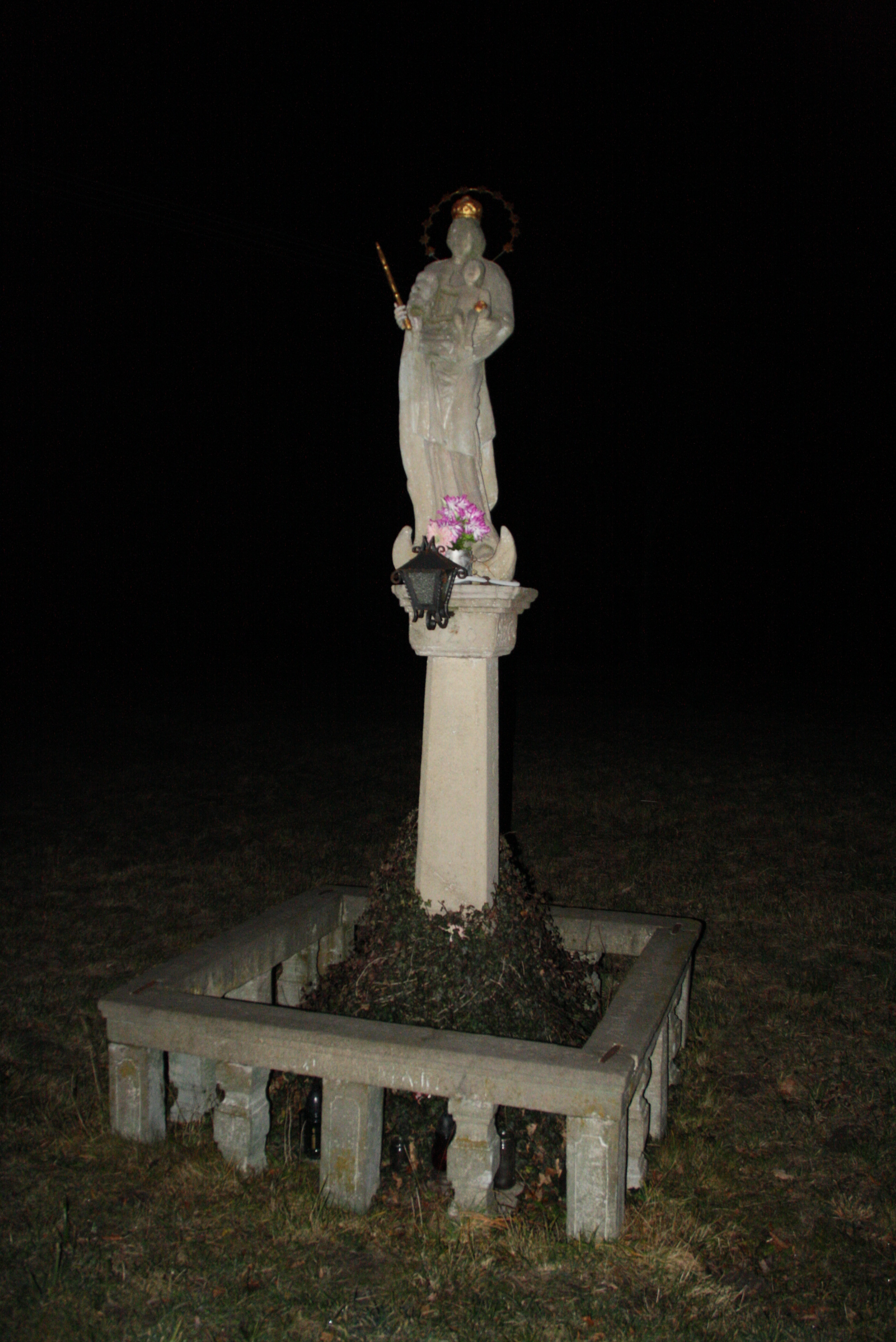 Sloup se sochou Panny Marie Immaculaty, Na Bystrém.